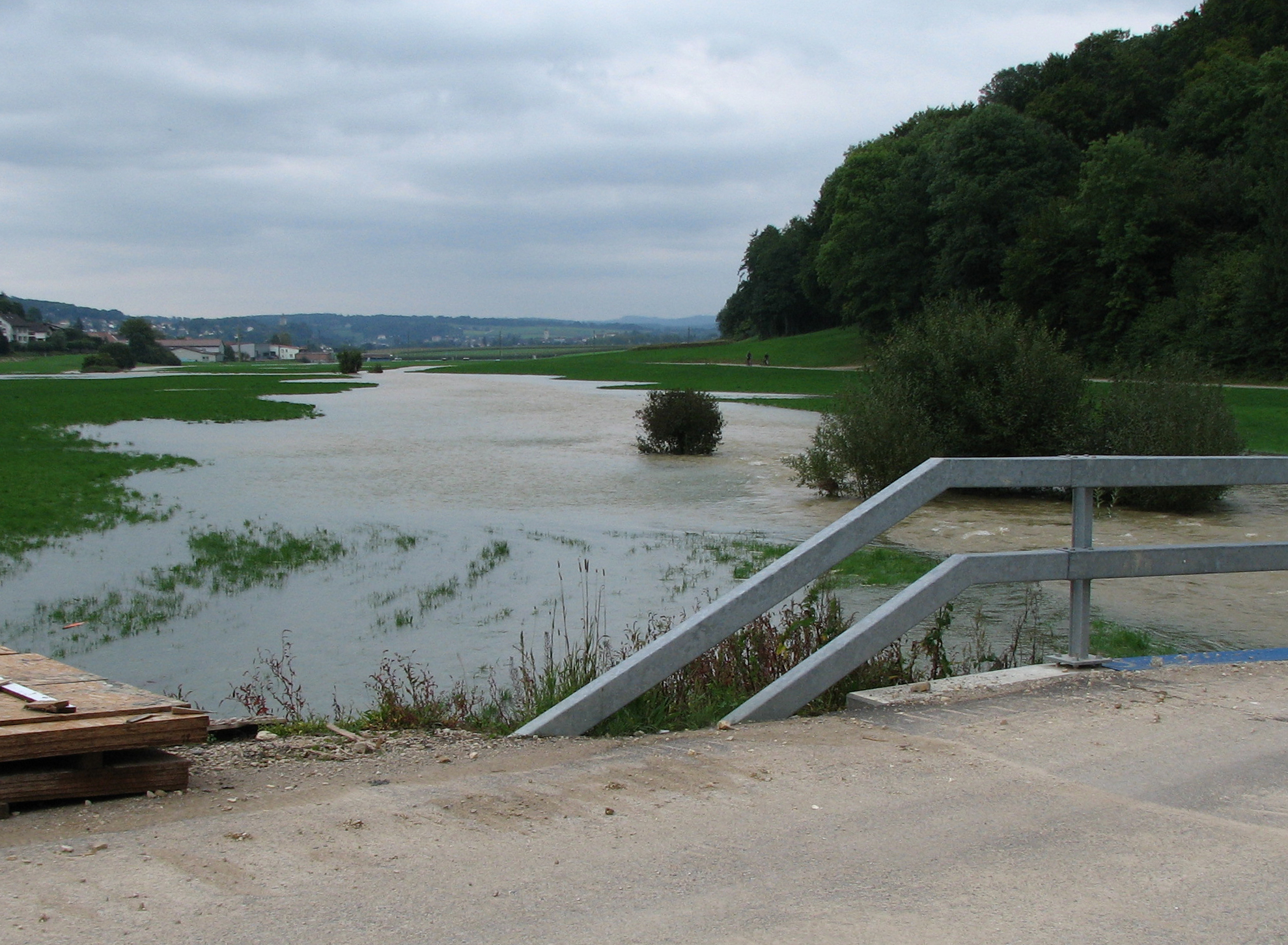 Le Creugenat en débordement. Le Creugenat est un gouffre, situé sur la commune de Chevenez, (Canton du Jura) en Suisse, qui normalement absorbe des eaux. En cas de crue le gouffre émet des eaux - il fonctionne en résurgence. Une formation géologique comme ça on s'appele "Estavelle".